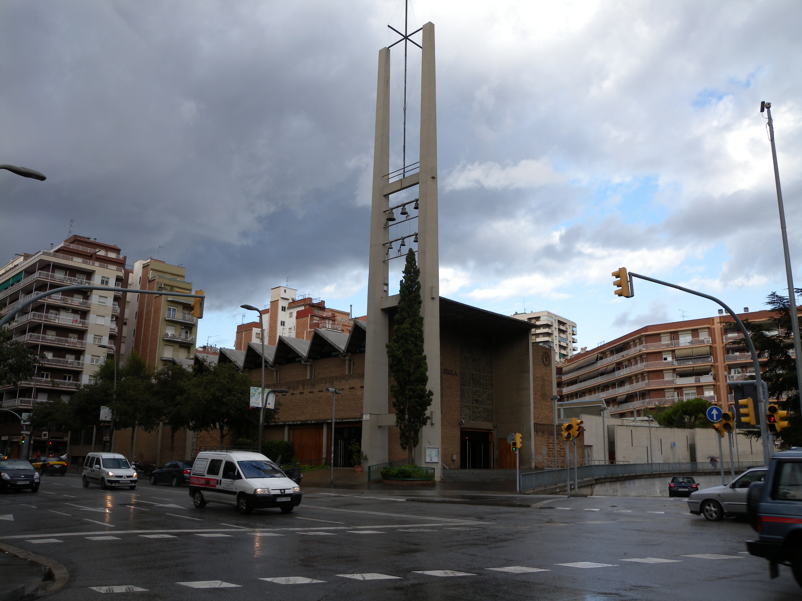 Sants-Badal, Barcelona, Spain